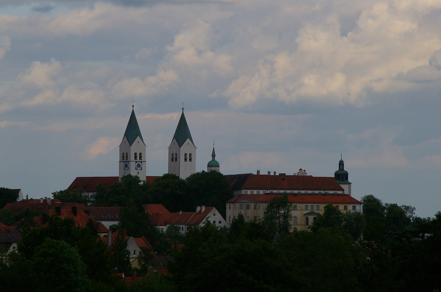 Mariendom Freising von Westen her fotografiert.